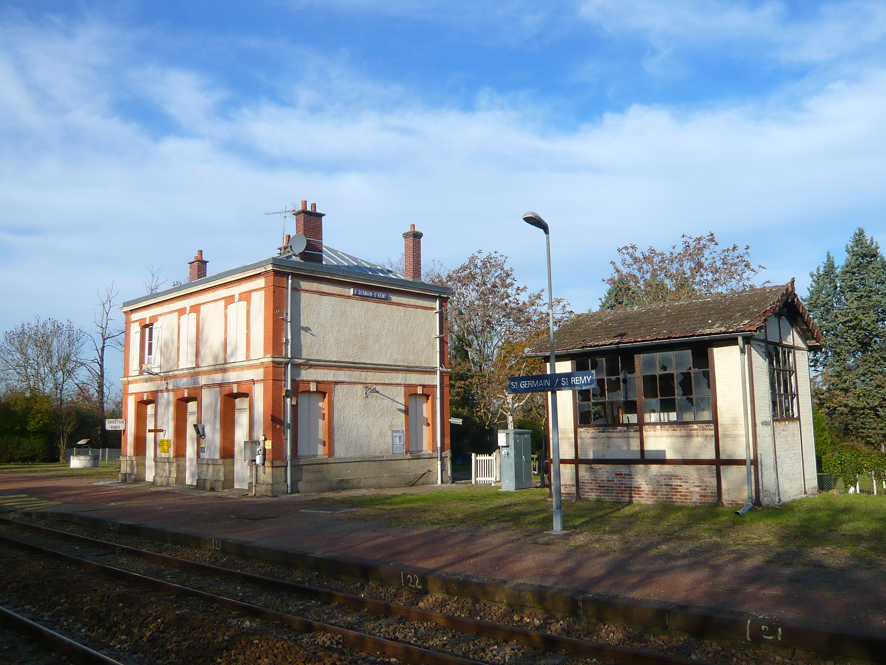 La Gare de Saint-Rémy désaffectée aujourd'hui et pour ajouter dans l'article correspondant.